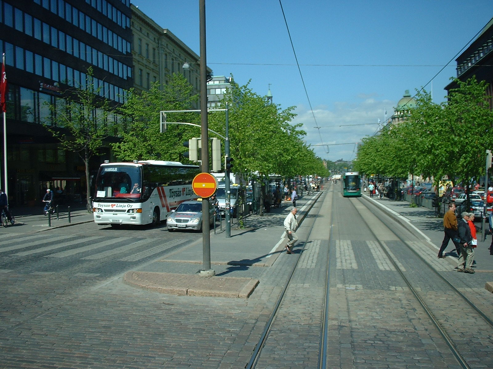 Mannerheimintie near Lönnrotinkatu crossing in Helsinki, Finland.